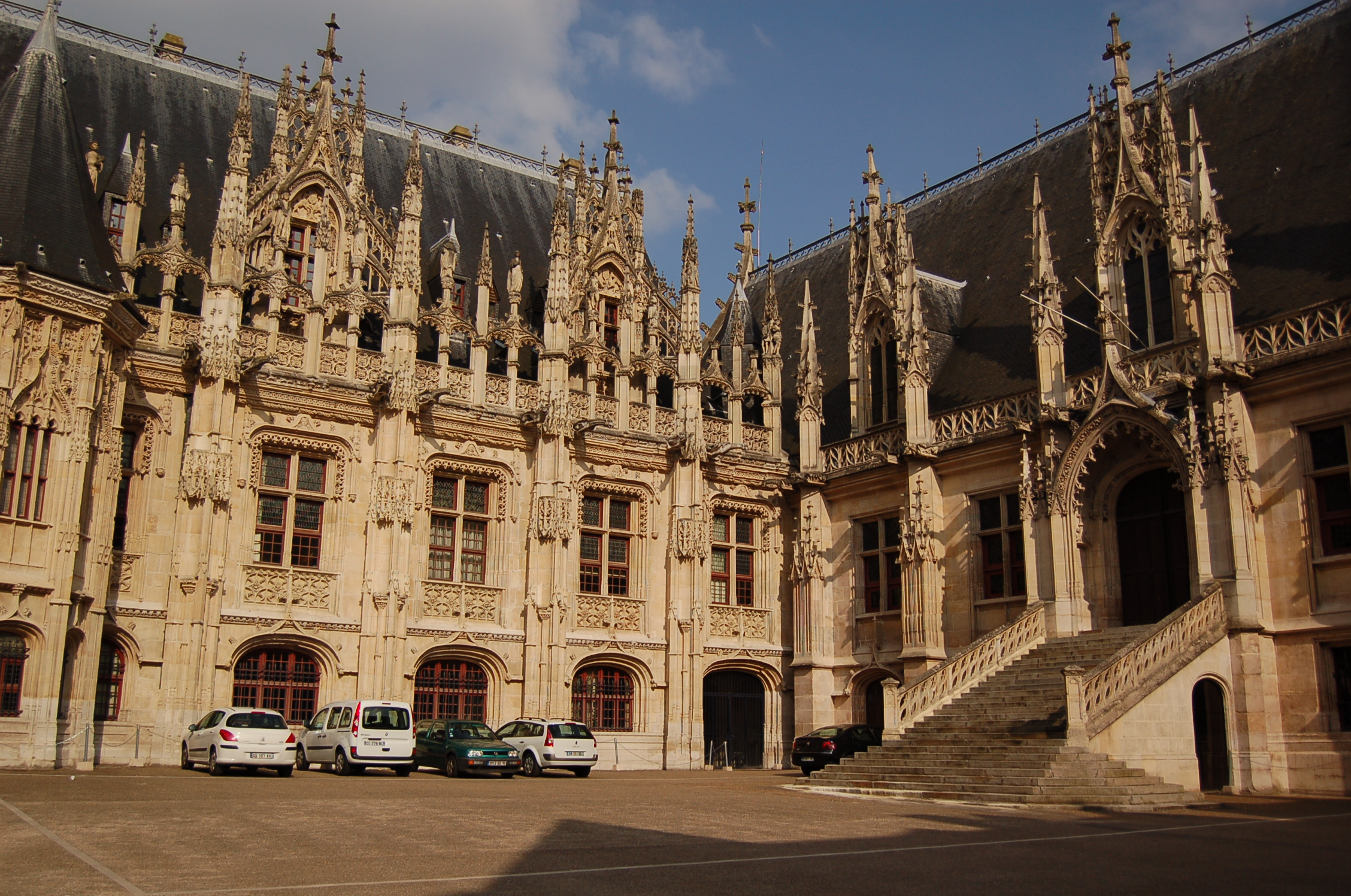 Palais de justice de Rouen